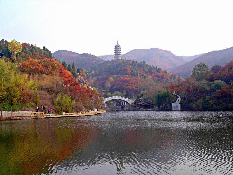 济南红叶谷国家森林公园。